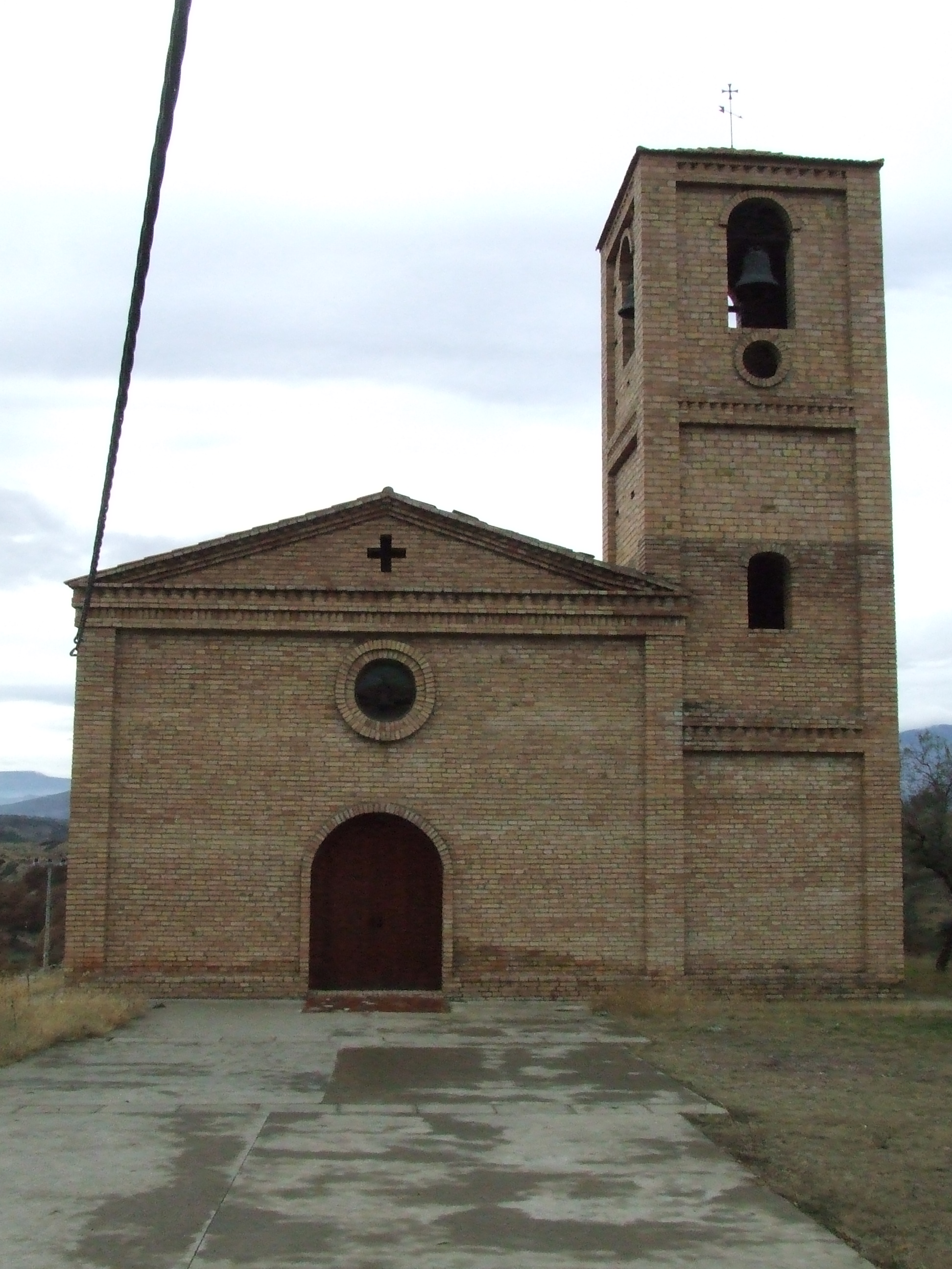 La nova església de Sant Fructuós d'Aramunt (Conca de Dalt, Pallars Jussà)